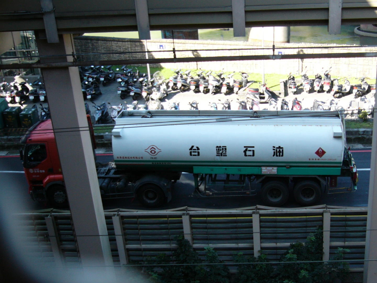 中文（台灣）: 從臺灣鐵路管理局百福車站第二月台出口階梯俯瞰安泰運輸的台塑石化油罐拖車FK-R1。